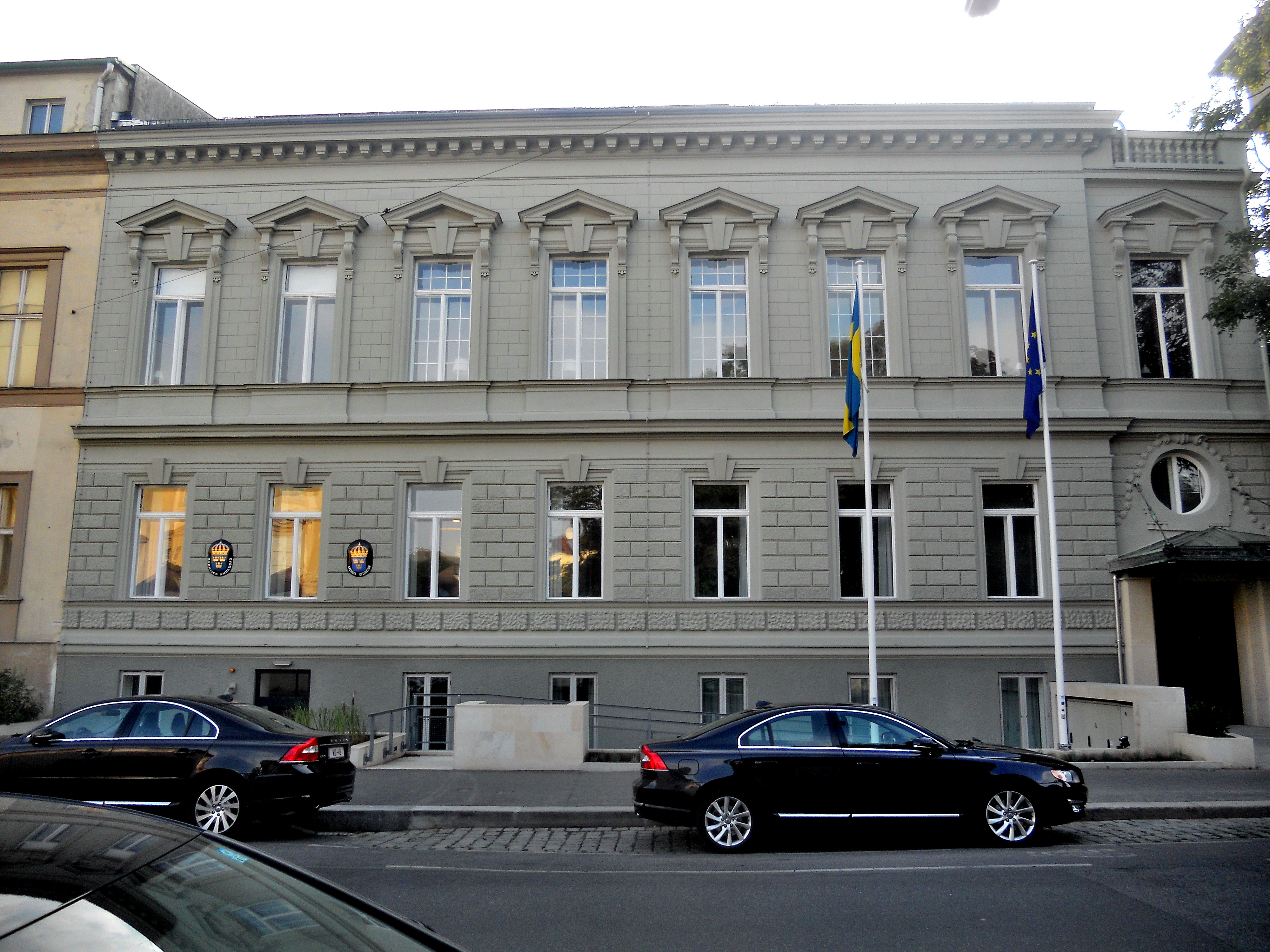 Ehem. Palais Szeps, Schwedische Botschaft